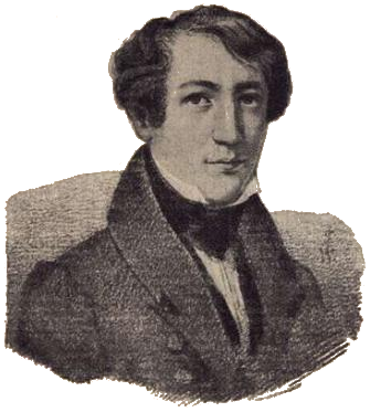 Den norske juristen Bernhard Dunker.